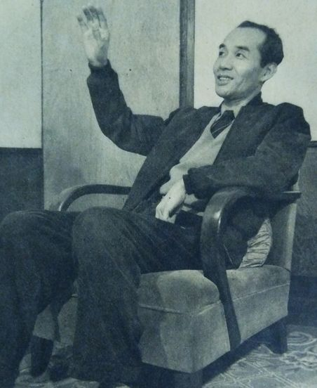 飯田信夫